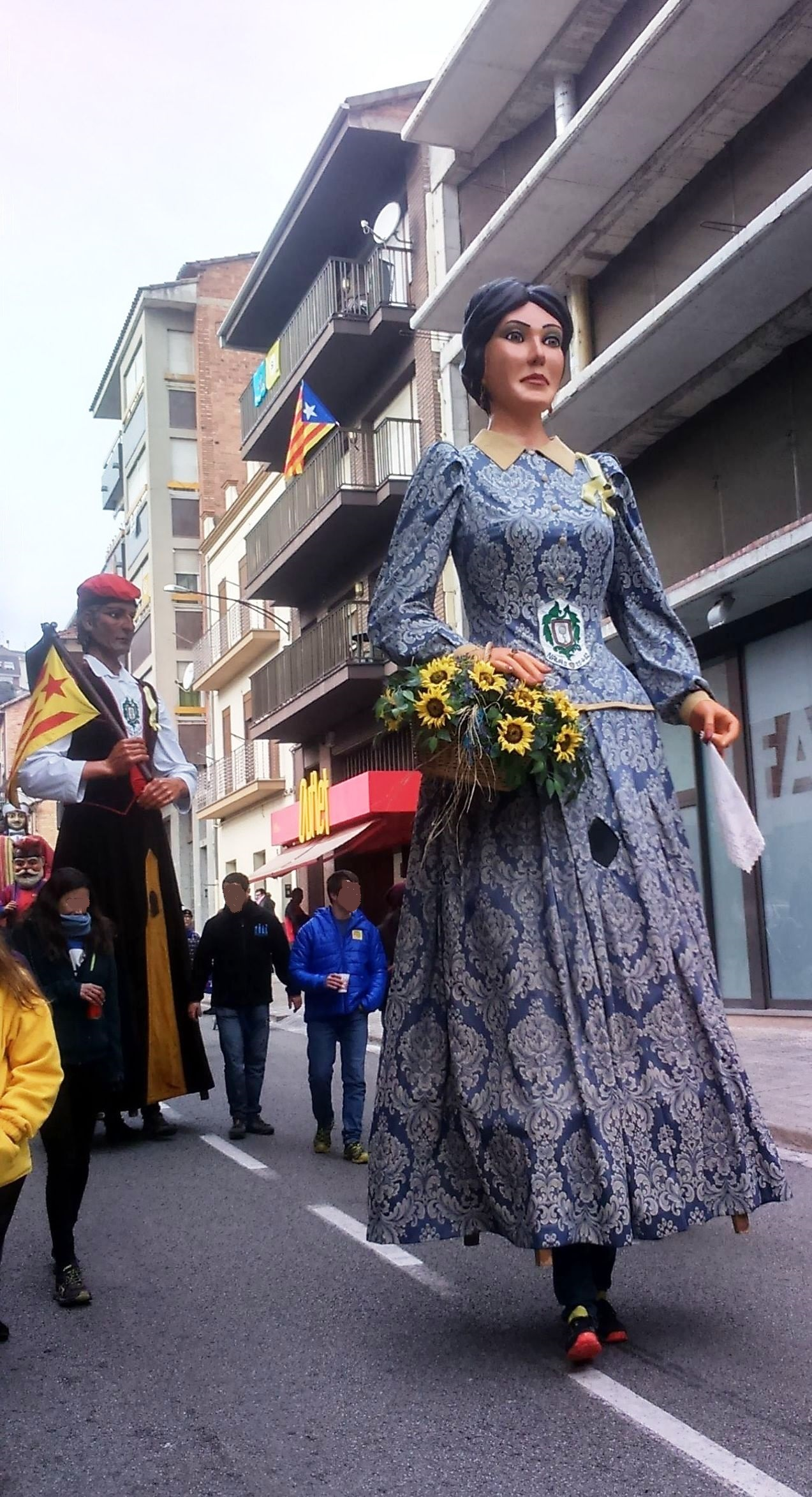 Eulàlia Geganta de Navas (Bages) Catalunya